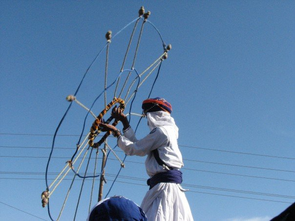 Gatka at Yuba City.